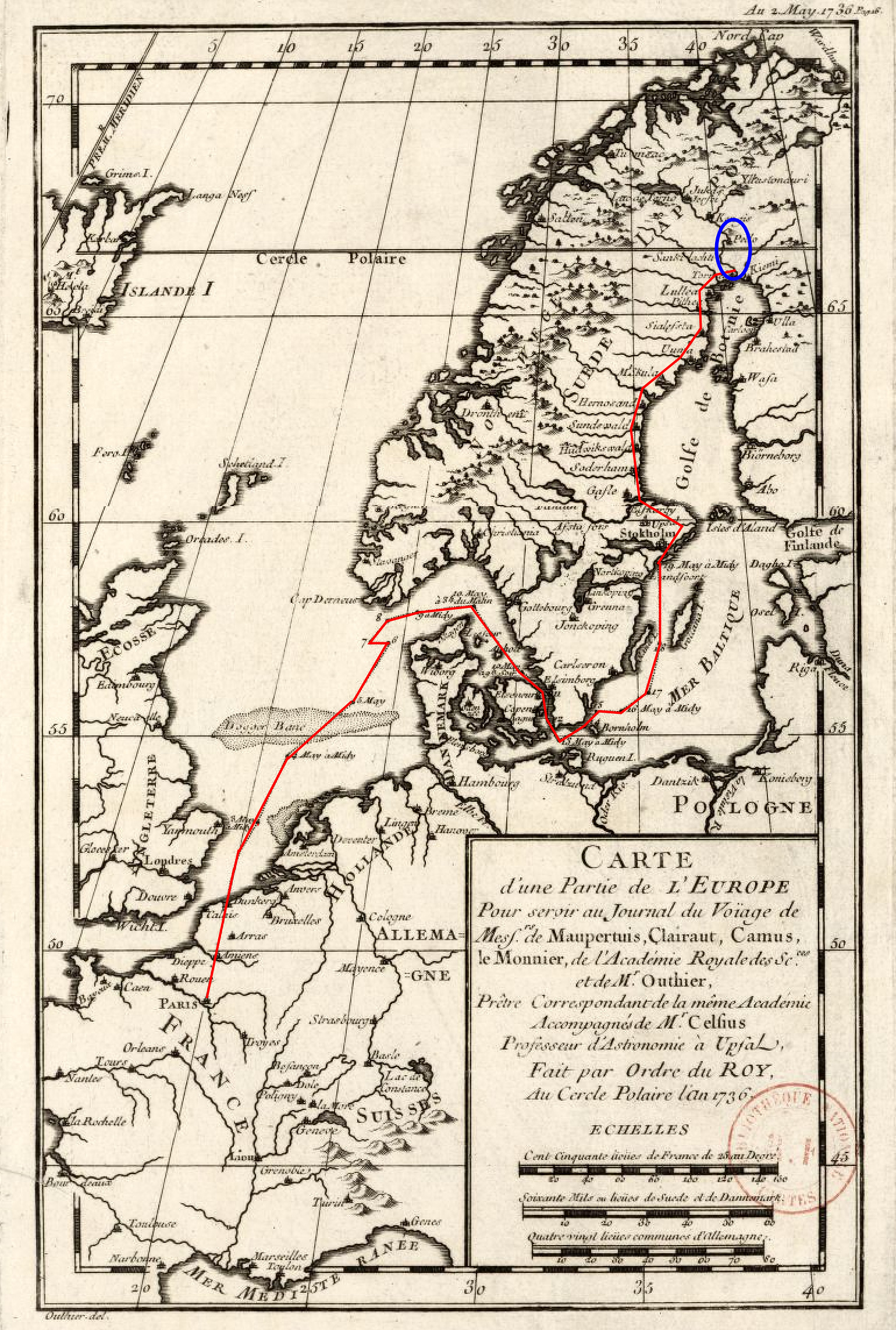 Expédition Maupertuis : itinéraire du voyage vers la Laponie en 1736.